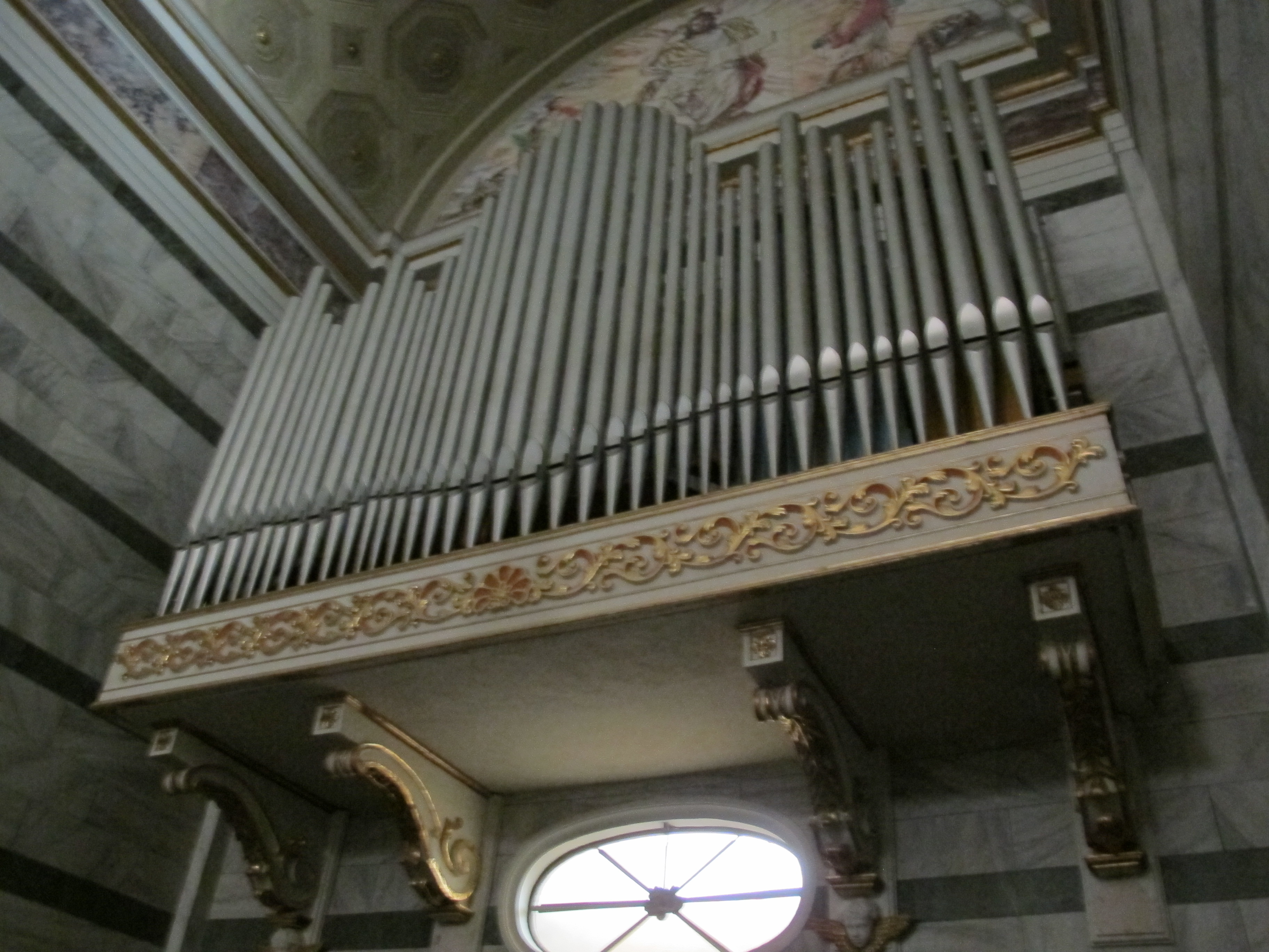 Duomo di san miniato, int., organo